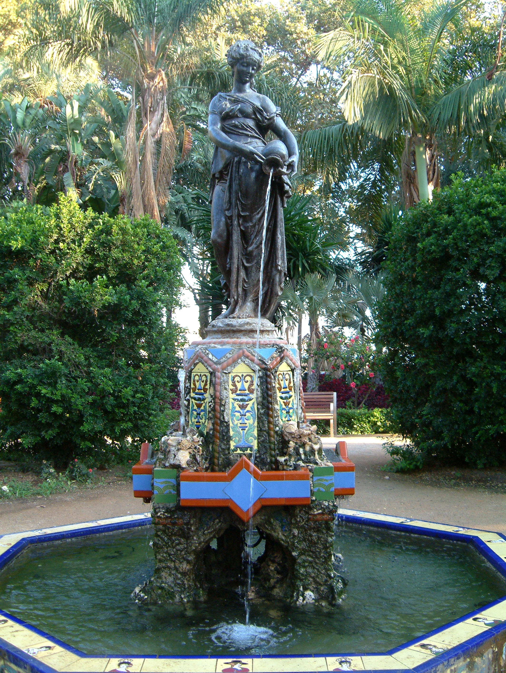 Málaga: Im Park an der Spanischen Promenade (Paseo de España) - "Ninfa del cántaro" (Nymphe mit Krug). Entwurf: A. Durenne (1877-78).